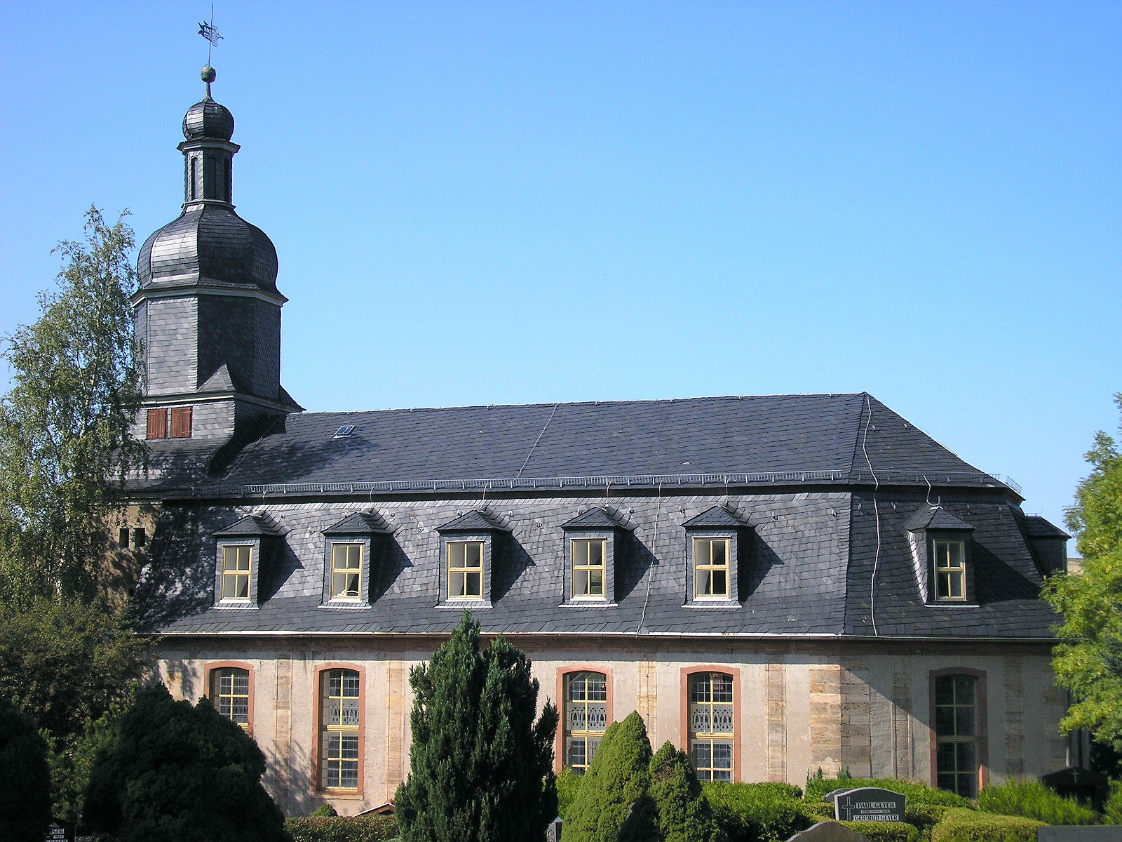 Die Kirche von Geraberg im Ilm-Kreis (Thüringen, Deutschland)